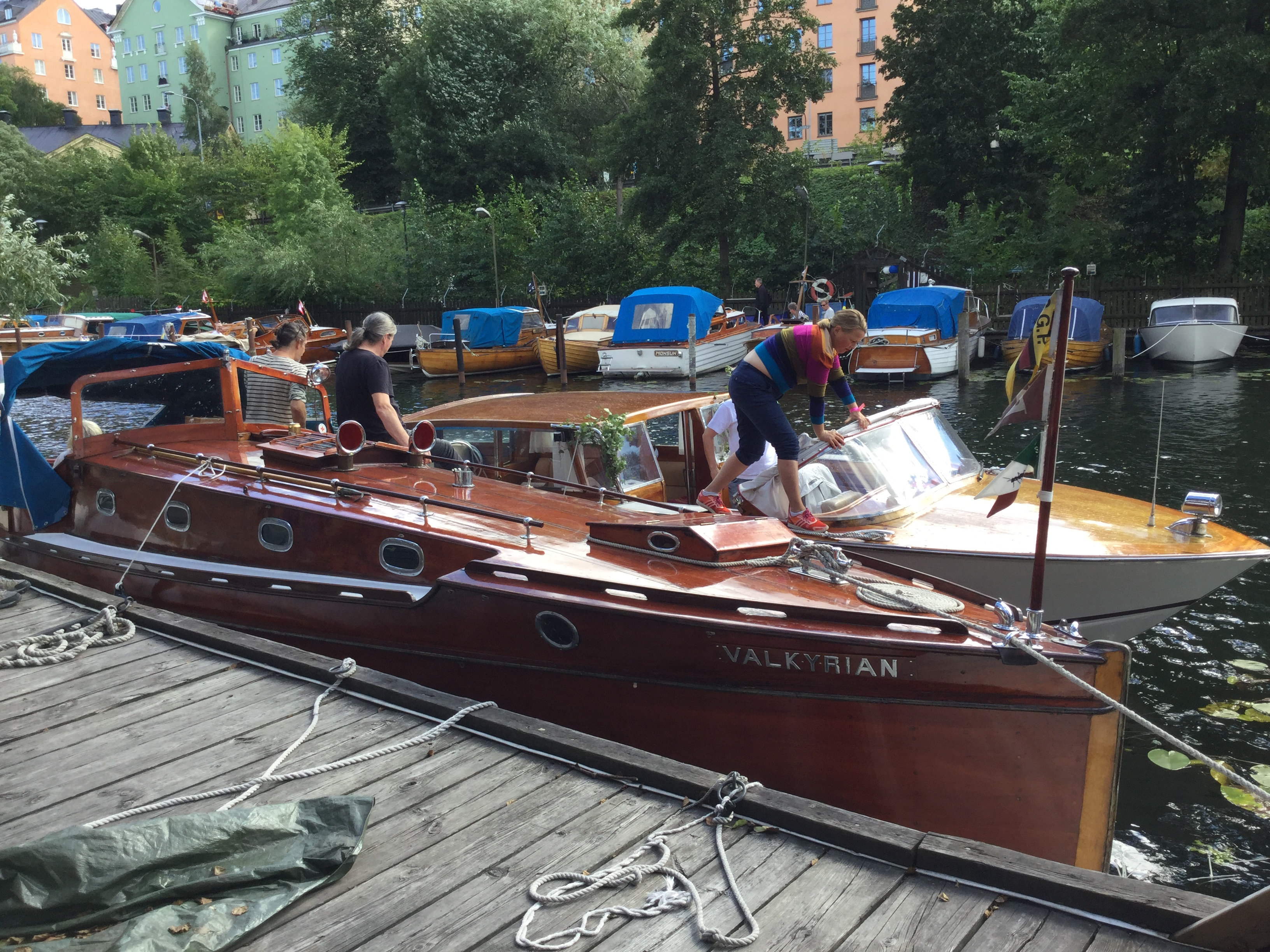 M/Y Valkyrian från 1910, konstruerad av Carl Gustaf Pettersson, fotograferad vid Heleneborgs båtklubb i Stockholm på Båtklubbarnas dag den 27 augusti 2016.